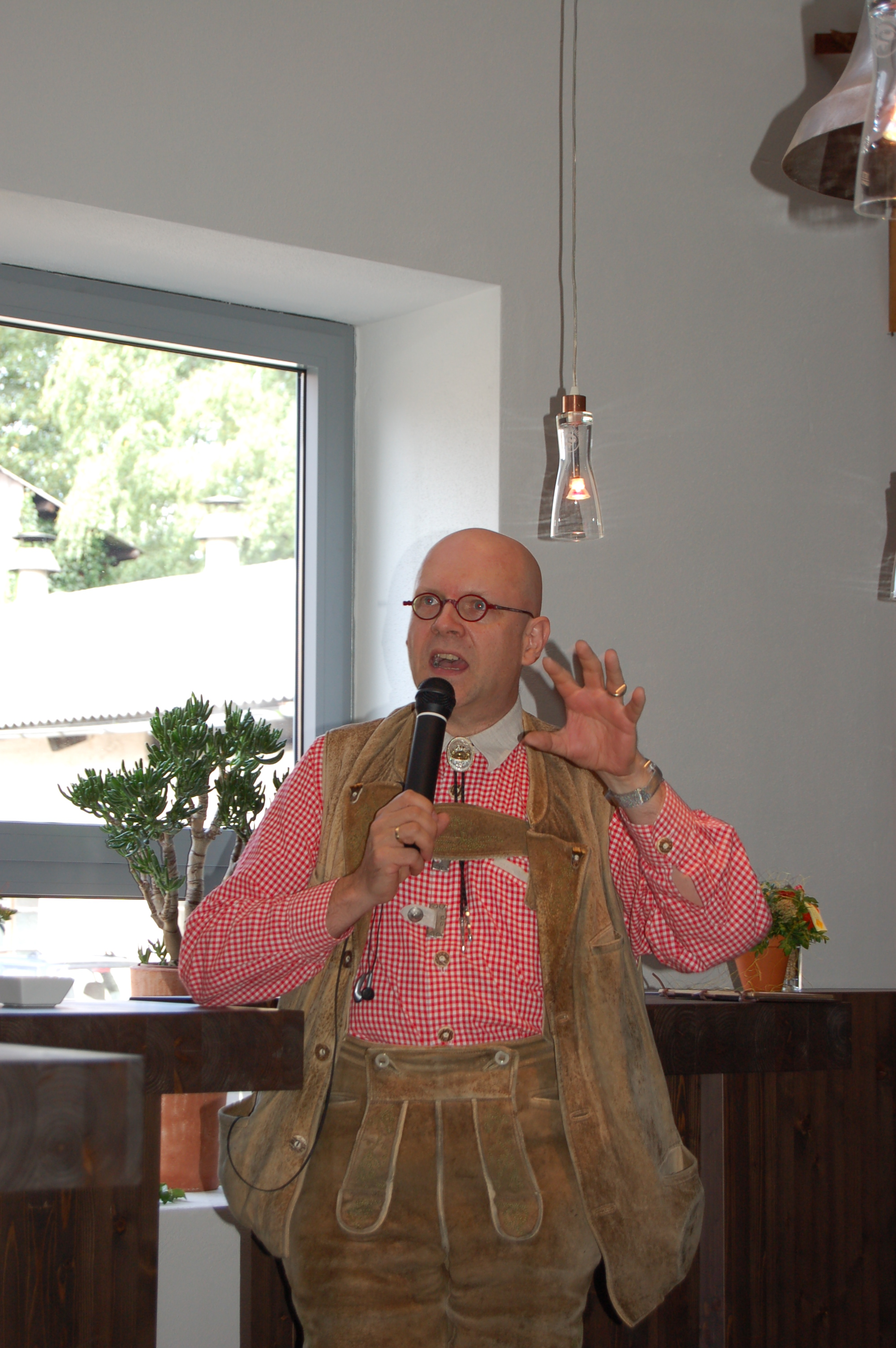 Conrad Seidl bei der Eröffnung des Brauhaus Gusswerk